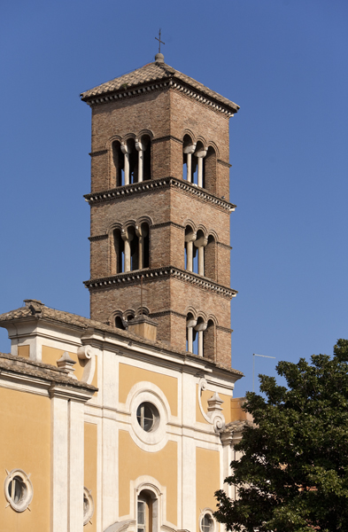 San Sisto Vechhio